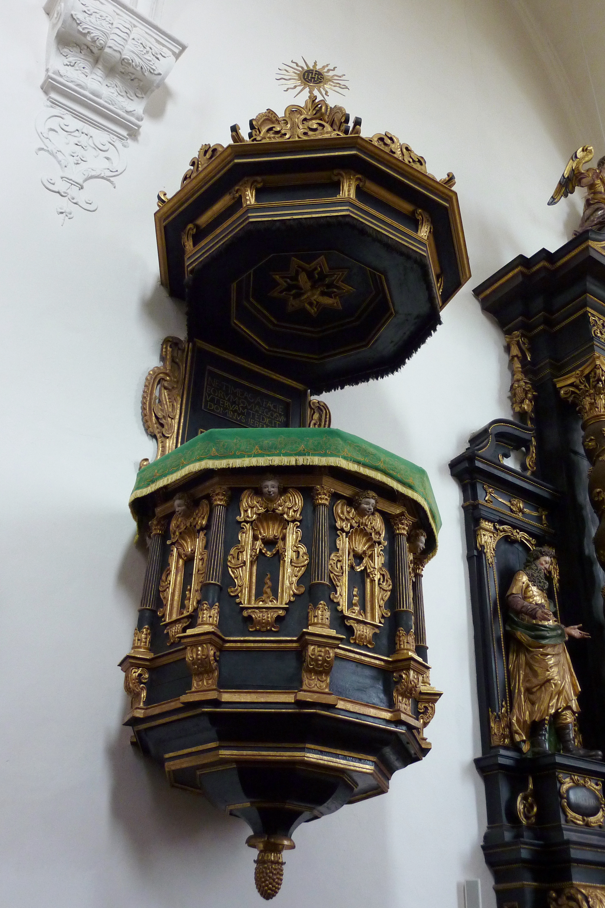 Katholische Pfarrkirche Mariä Himmelfahrt, ehemalige Kirche des Zisterzienserinnenklosters in Kirchheim am Ries im Ostalbkreis (Baden-Württemberg), barocke Kanzel